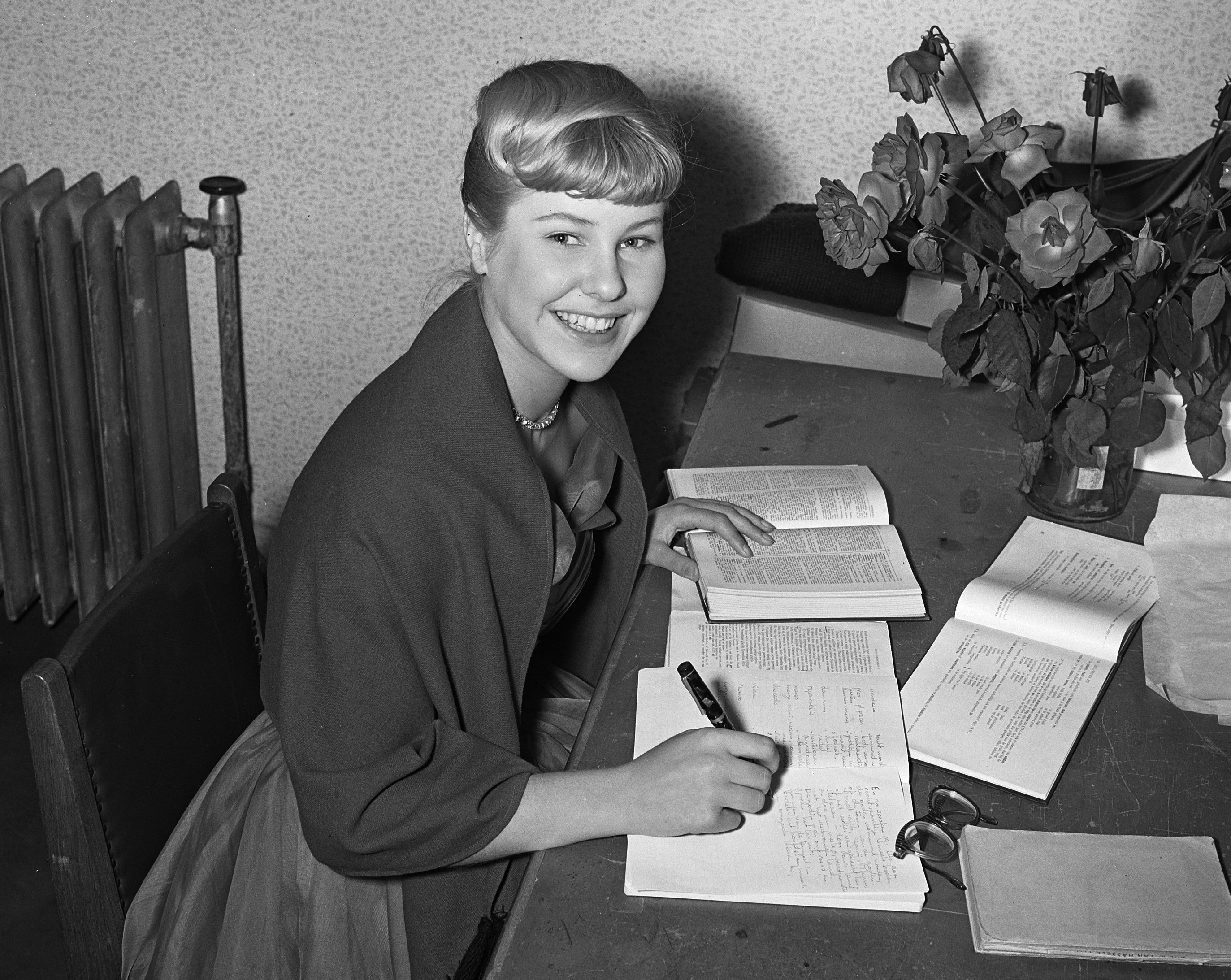 Collectie / Archief : Fotocollectie Anefo Reportage / Serie : Opnamen van de speelfilm "Het wonderlijke leven van Willem Parel", met Wim Sonneveld Beschrijving : Femke Talsma, de jongste ster Datum : 10 november 1954 Trefwoorden : acteurs, filmopnamen, films, filmsterren, portretten, toneelspelers Persoonsnaam : Talsma, Femke Fotograaf : Pot, Harry / Anefo Auteursrechthebbende : Nationaal Archief Materiaalsoort : Glasnegatief Nummer archiefinventaris : bekijk toegang 2.24.01.09 Bestanddeelnummer : 906-8358